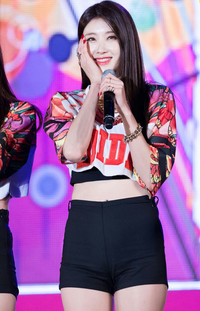 150919 서래마을 몽마르뜨공원 한불음악축제 나인뮤지스 현아